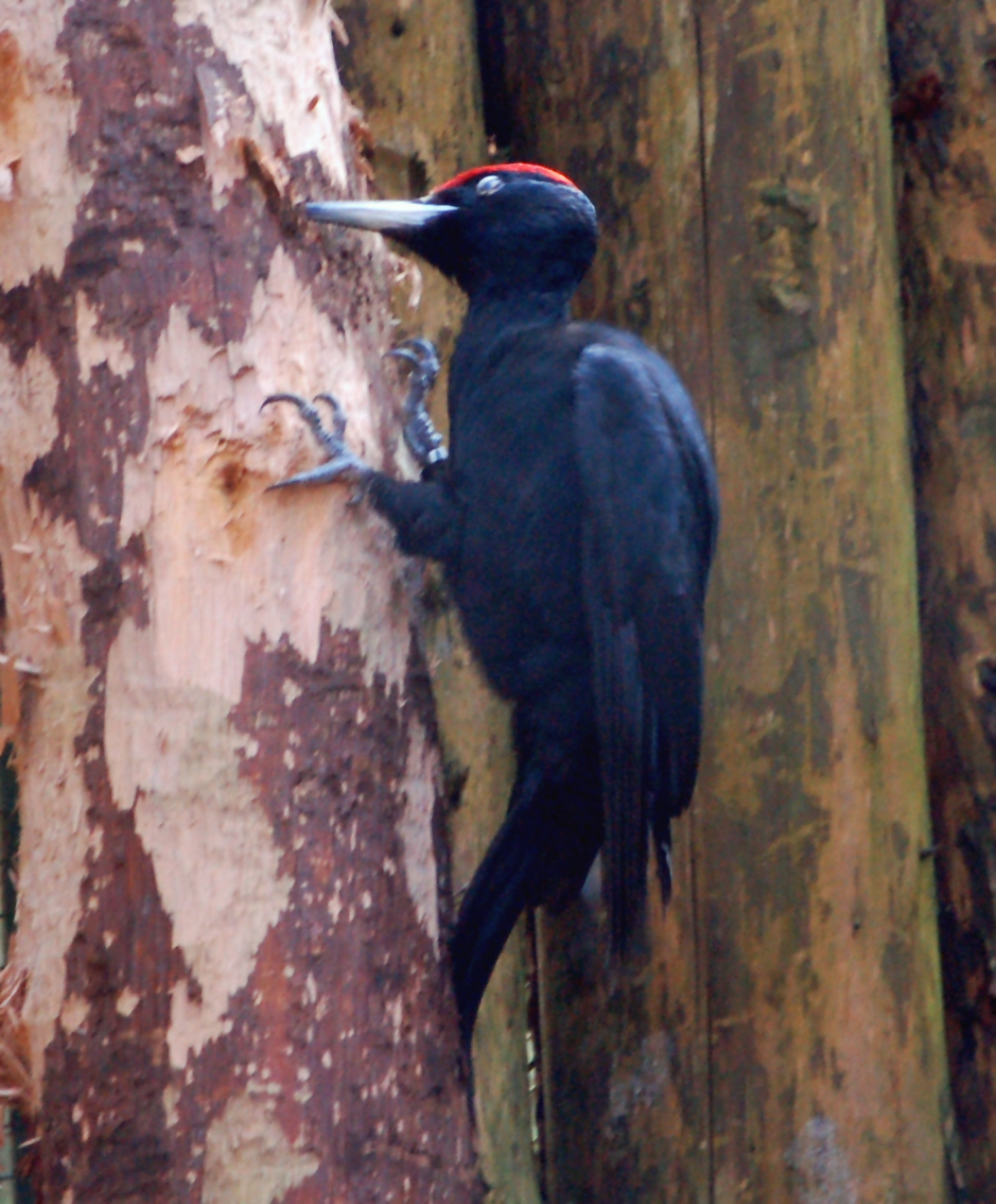 Schwarzspecht Dryocopus martius im Wildpark Eekholt